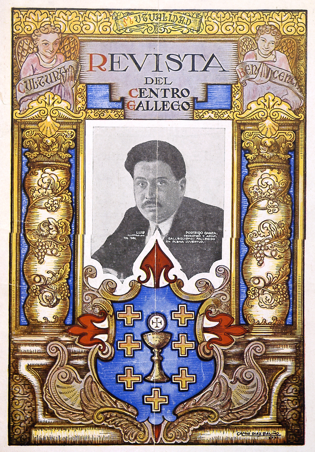 Galicia. Revista del Centro Gallego de Buenos Aires, n.º 235, portada realizada por Camilo Díaz.